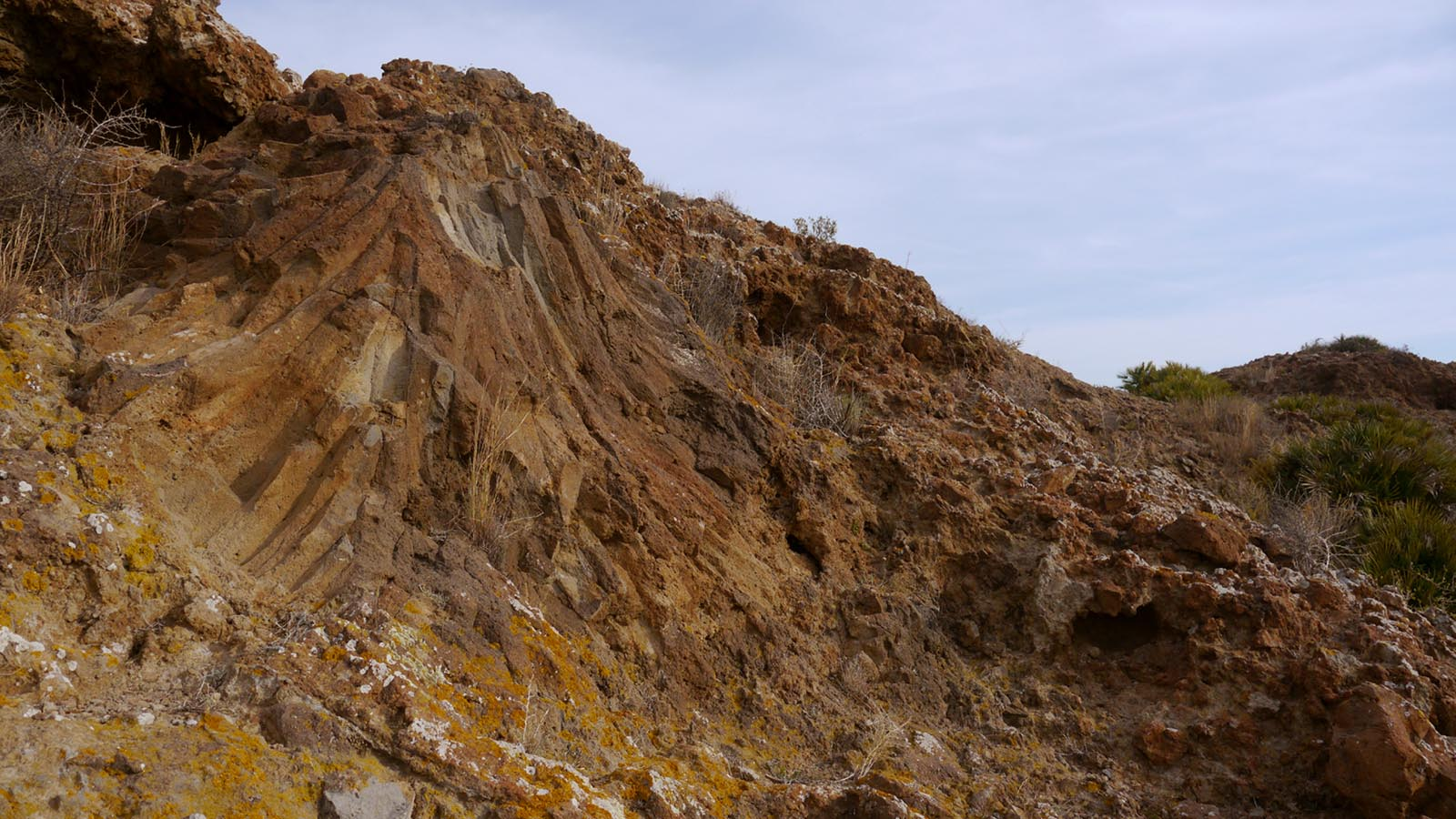 Disyunciones columnares en el volcán de El Carmolí, Cartagena (España)